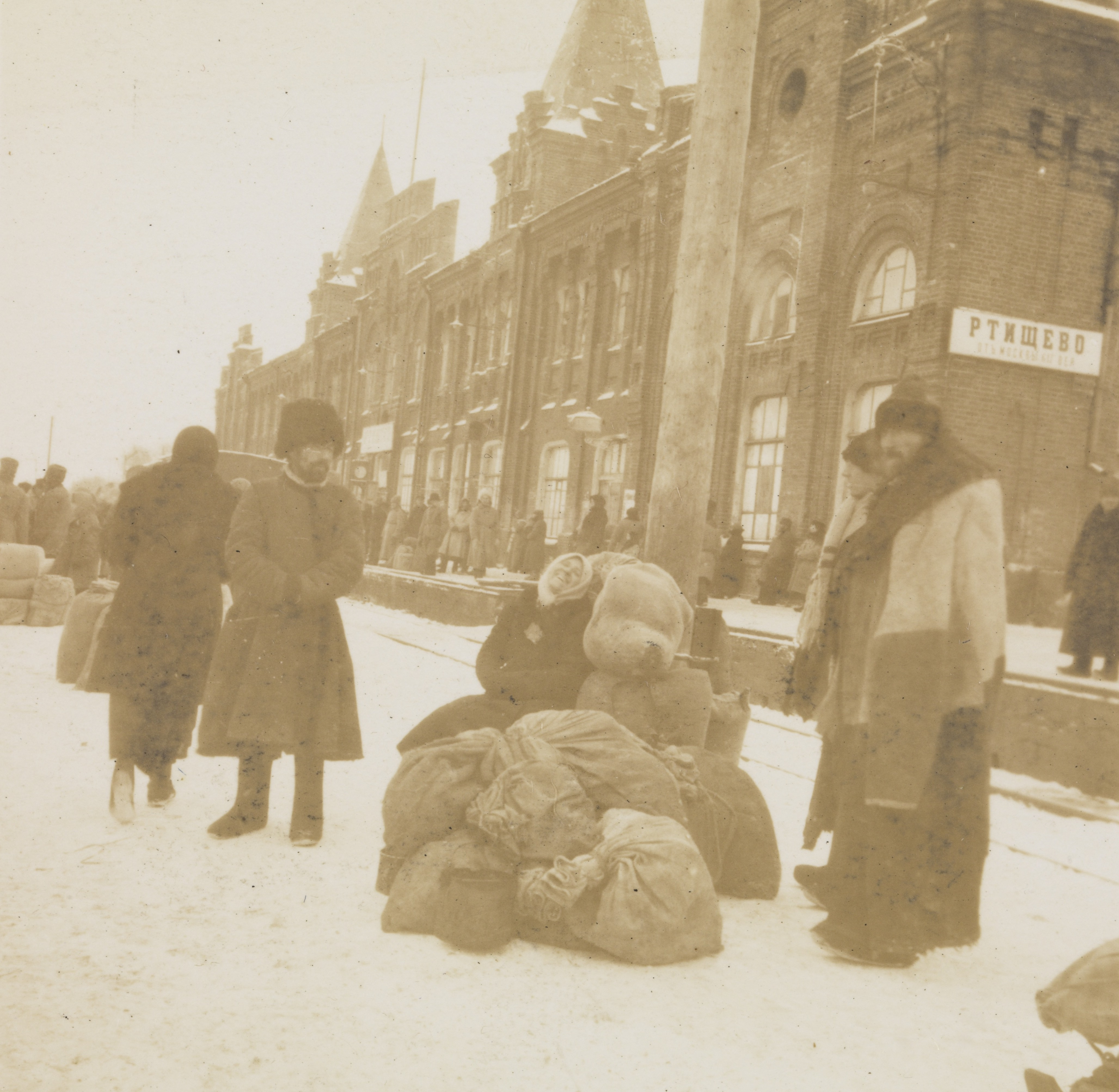 De reisende med sine eiendeler på perrongen i Ritisjtsjevo (nord for Saratov). Ett av bildene fra reisen til Russland i november og desember 1921. På oppdrag fra Det Internasjonale Røde Kors besøkte Fridtjof Nansen områder som ble hardest rammet av hungersnøden. Depicted place: Russland, Ratisjtsjevo